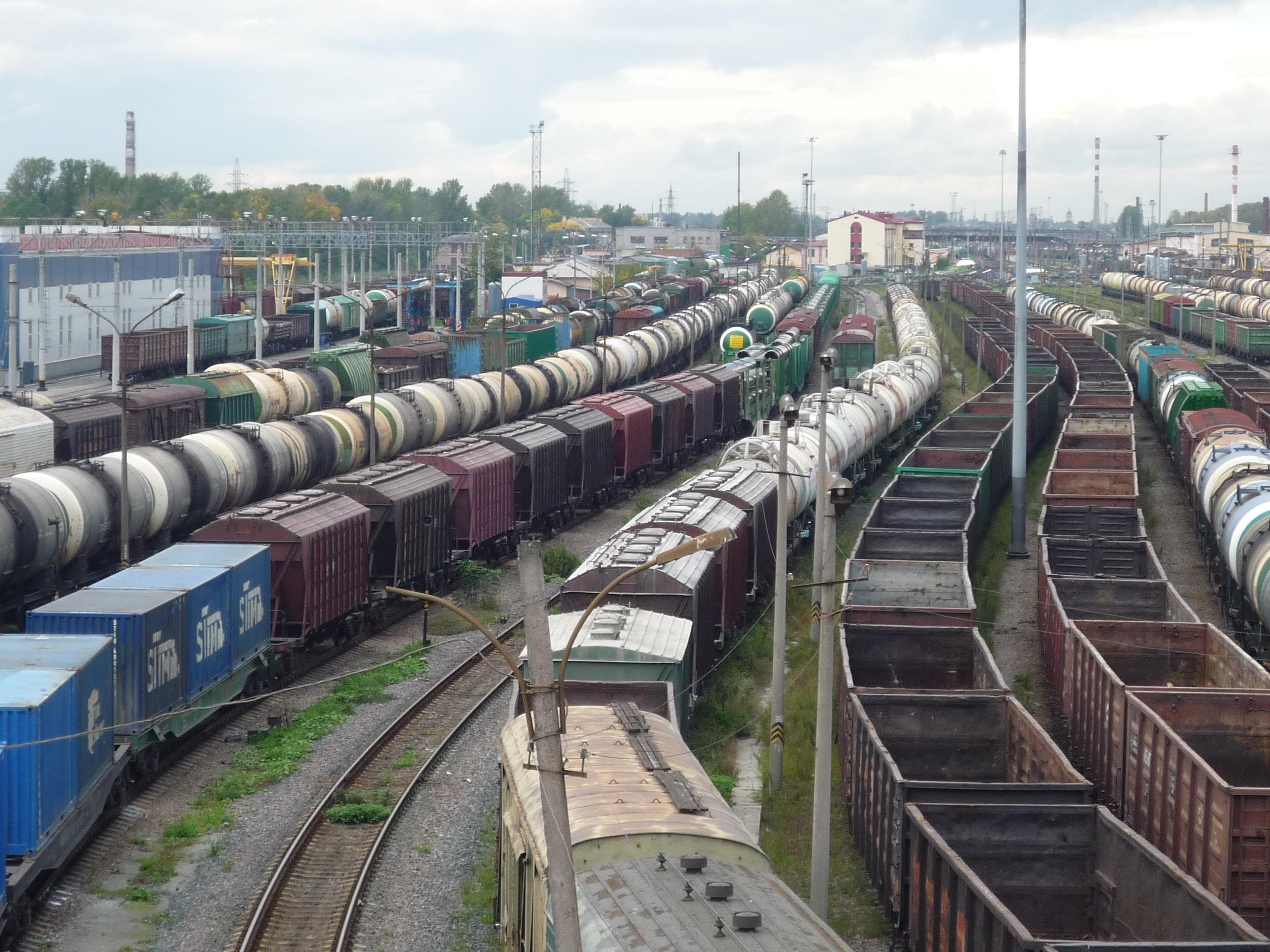 Сортировка